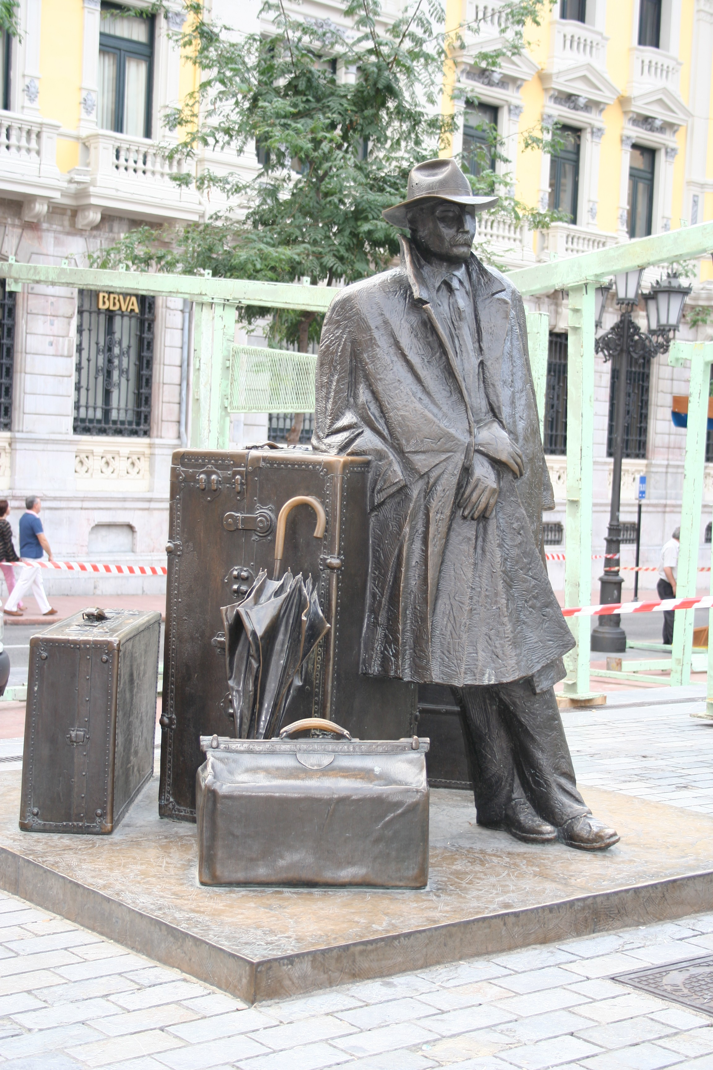 Dedicado al viajero